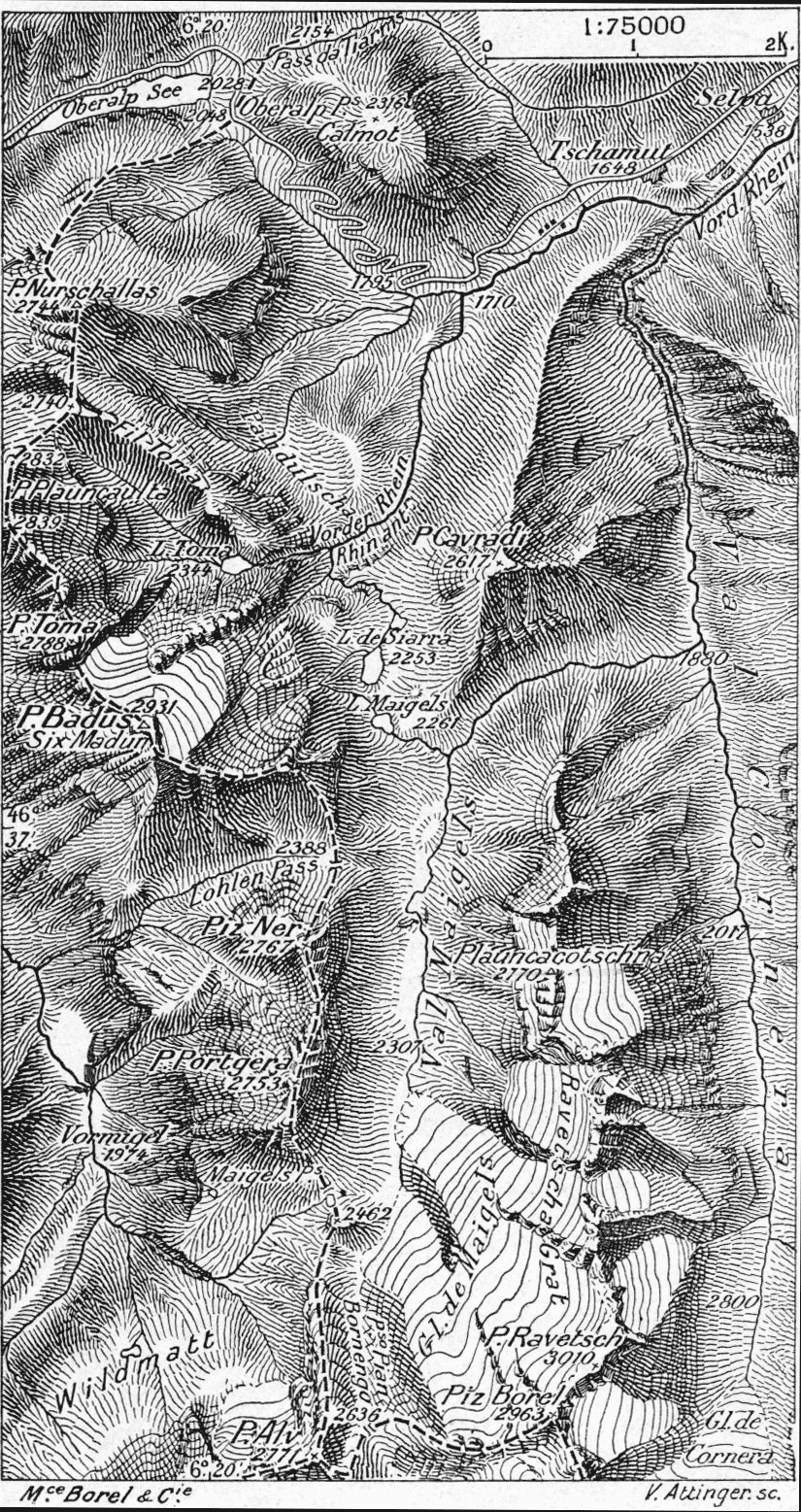 Quellgebiet des Vorderrheins: Val Maighels, Graubünden